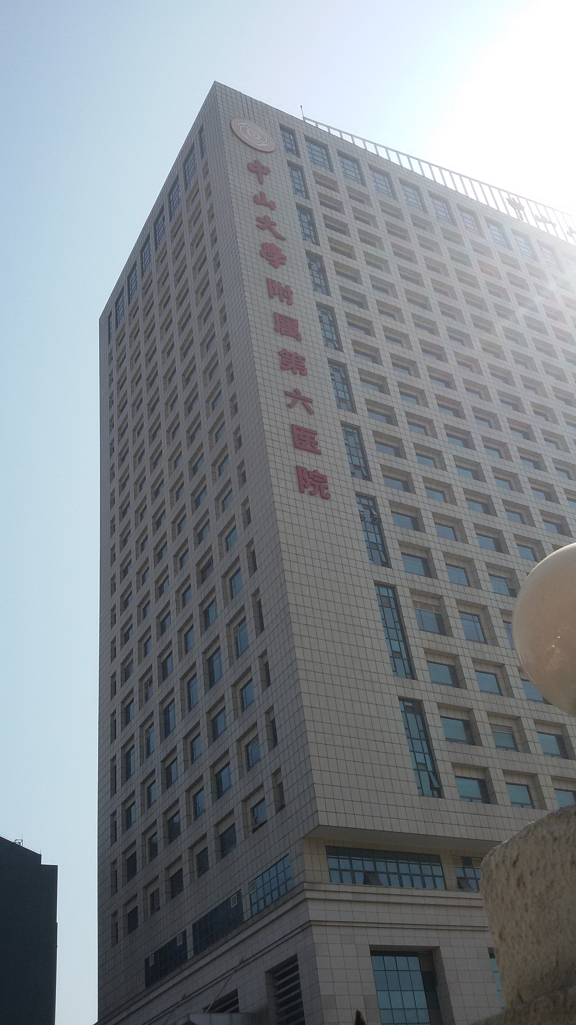 粵語: 中山大學附属第六医院